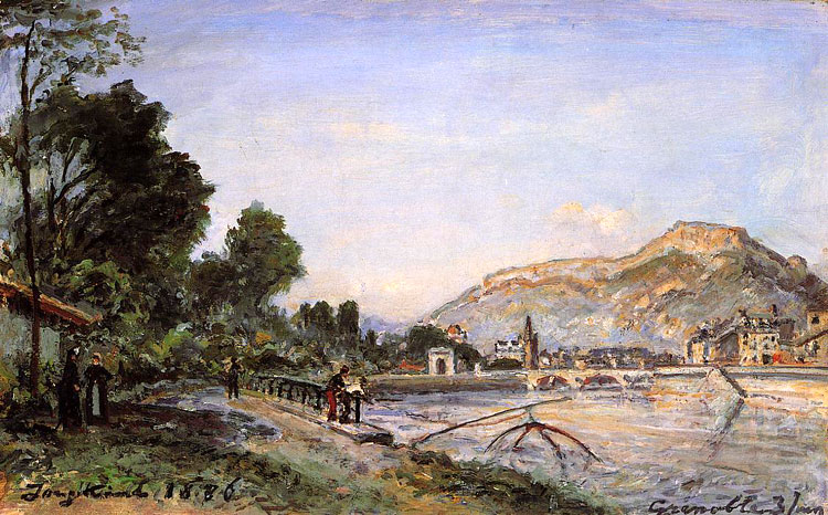 Bords de l'Isère. Aujourd'hui Quai Jongkind.